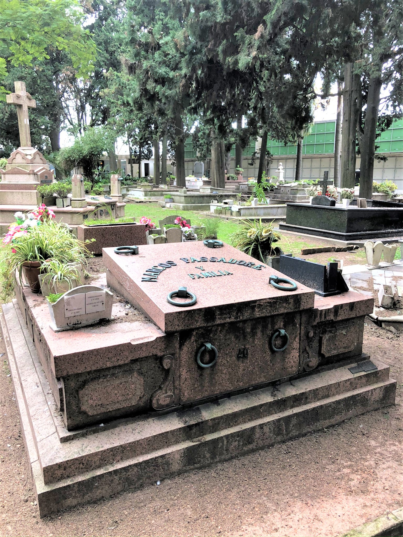 Tumba de la familia Passadore en el Cementerio de la Teja, Montevideo.